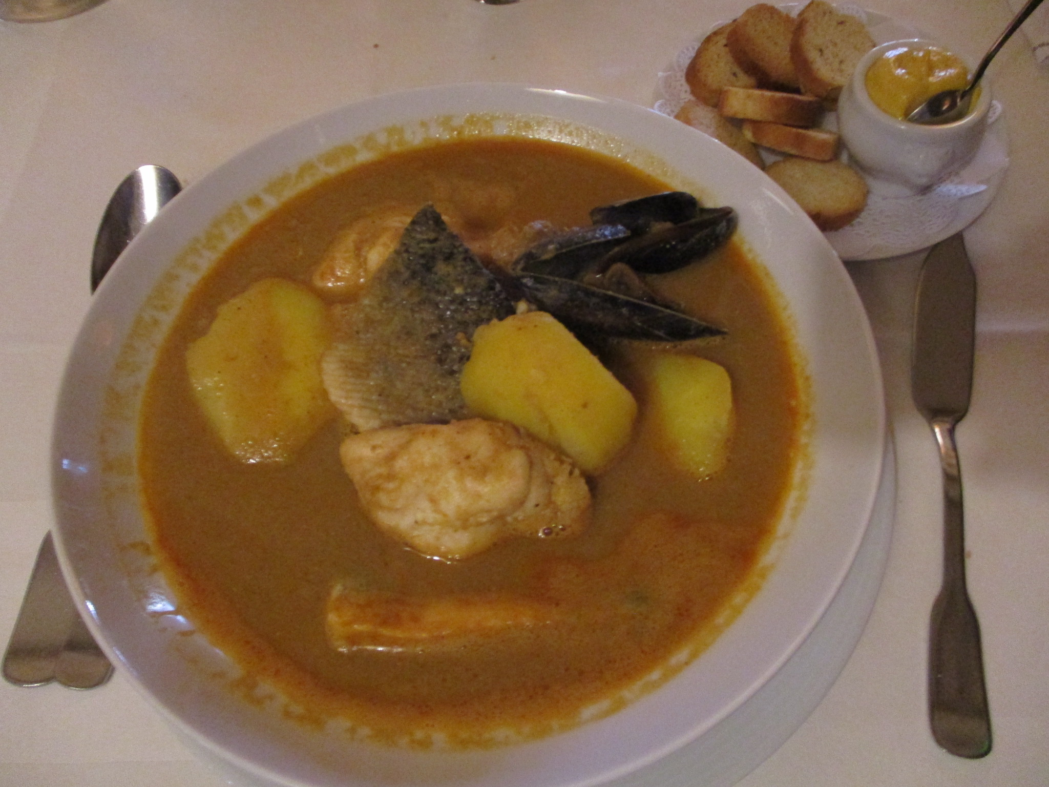 Bouillabaisse du vieux port de Marseille